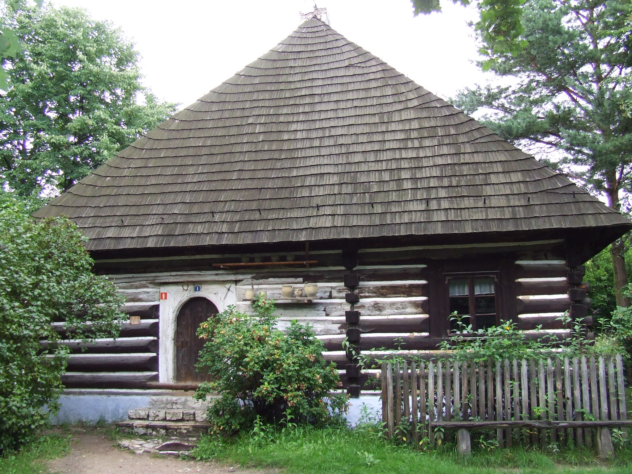 Wygiełzów, skansen, dom z Chrzanowa z 1804 r.